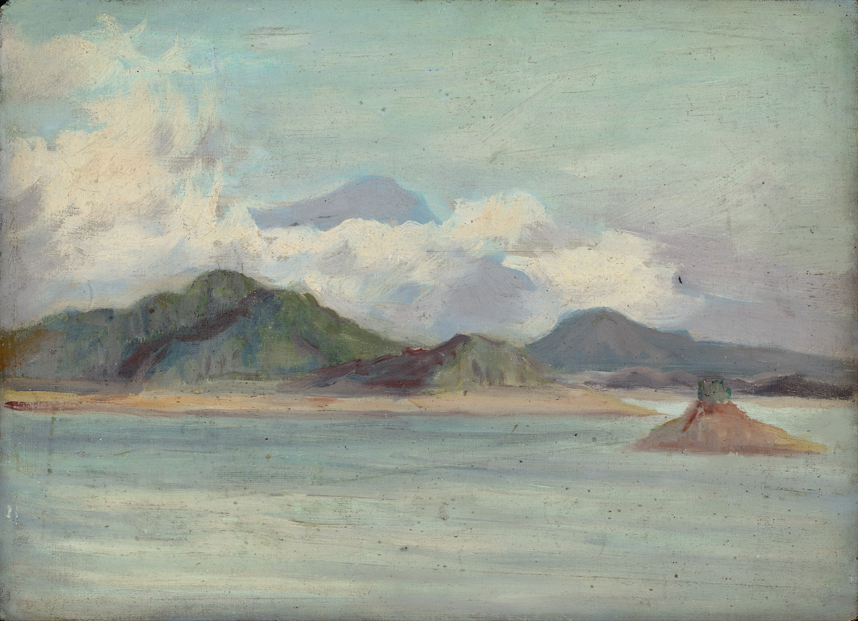 中文（台灣）: 李梅樹作品：日月潭，油彩 木板。 日月潭寫生的小幅畫作。當時還有潭中島可上岸遊走。原名拉魯島後改為光華島。因921地震及水位波浪影響逐漸消失。畫家則留下當年的景象。